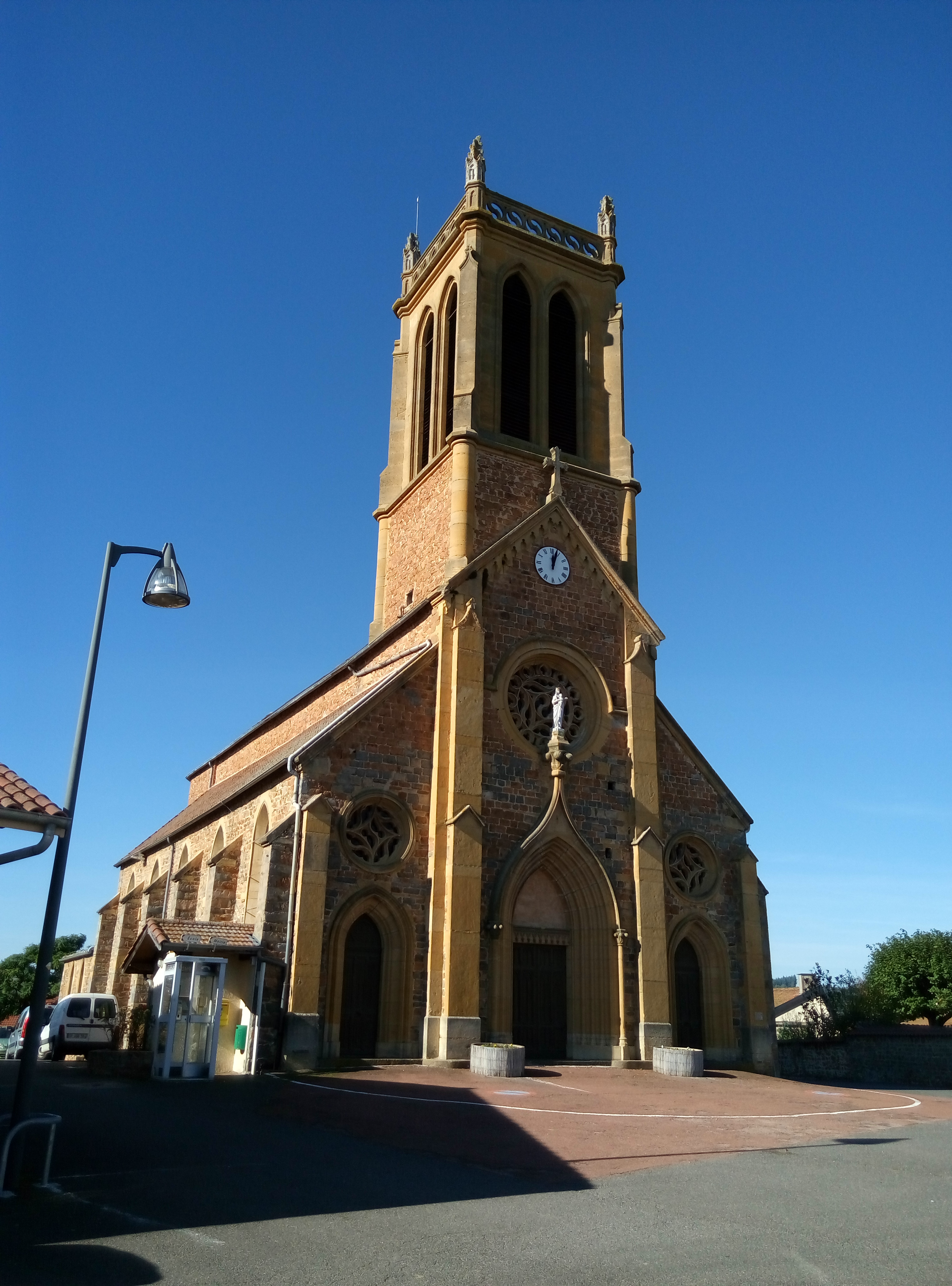 Église Saint-Étienne de Combre, dans le département de la Loire.